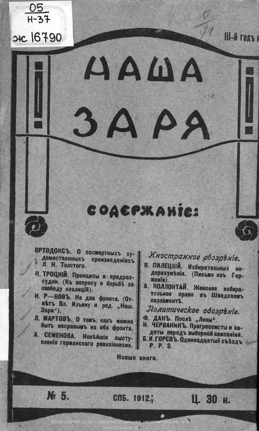 Наша заря (№05, 1912, обложка)